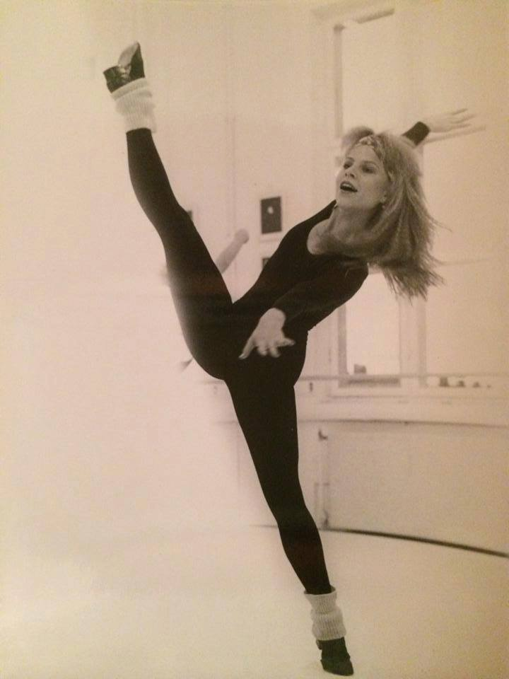 Dans